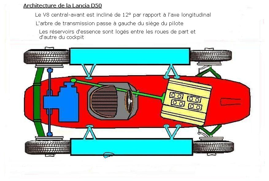 Schéma de la Lancia D50